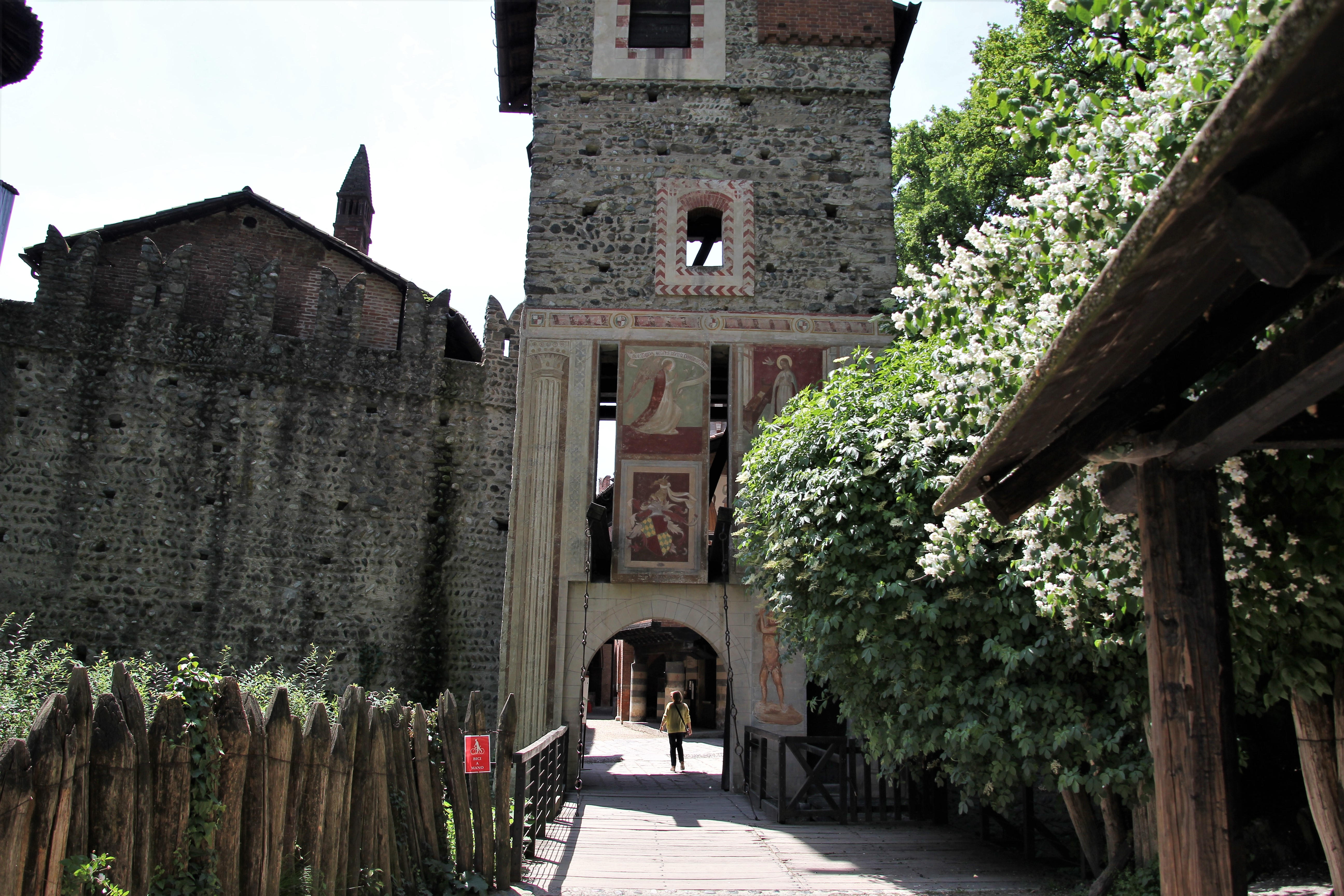 Torino, borgo medievale This is a photo of a monument which is part of cultural heritage of Italy.